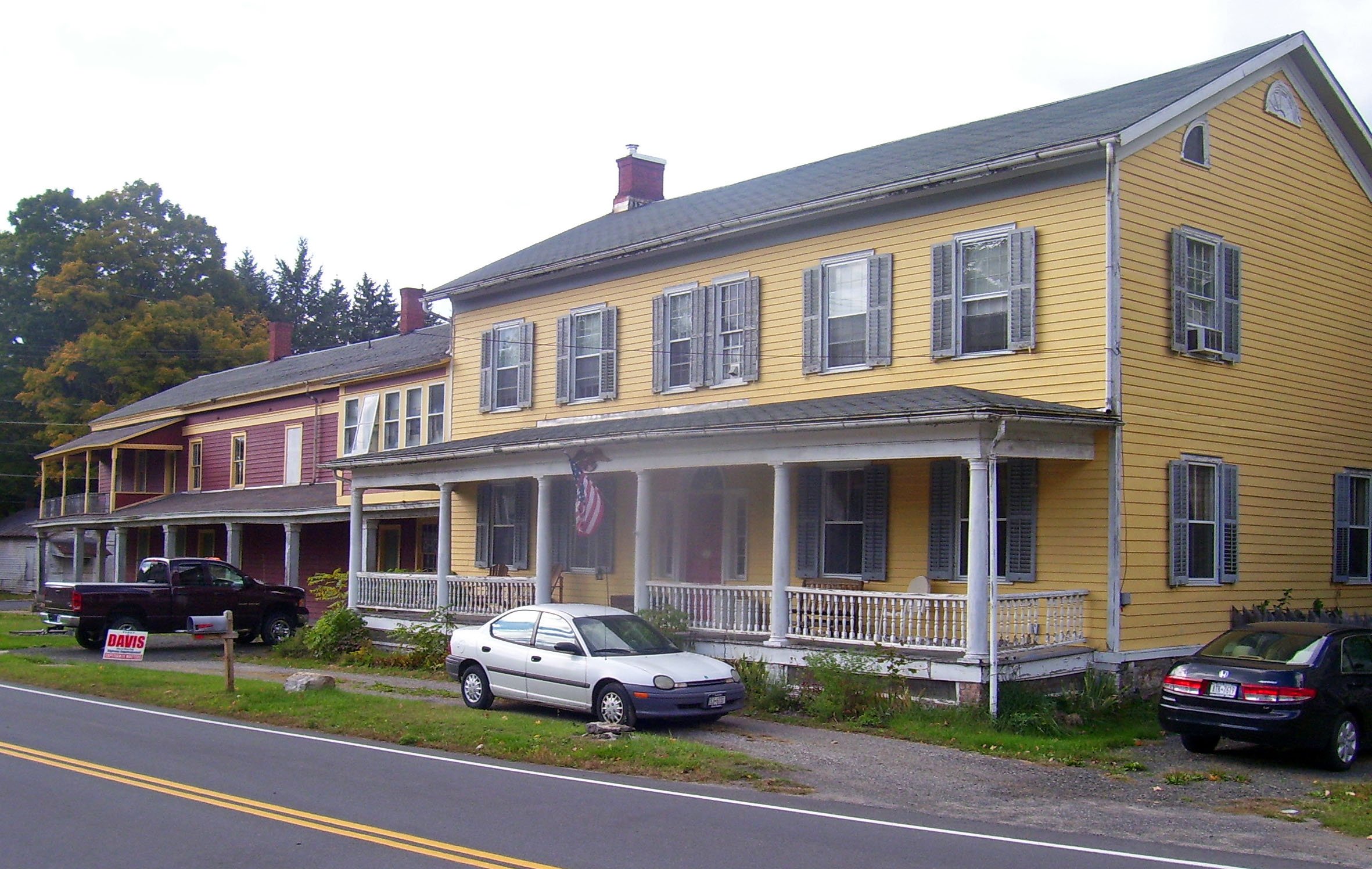 Hoornbeek Store in Napanoch, NY, USA